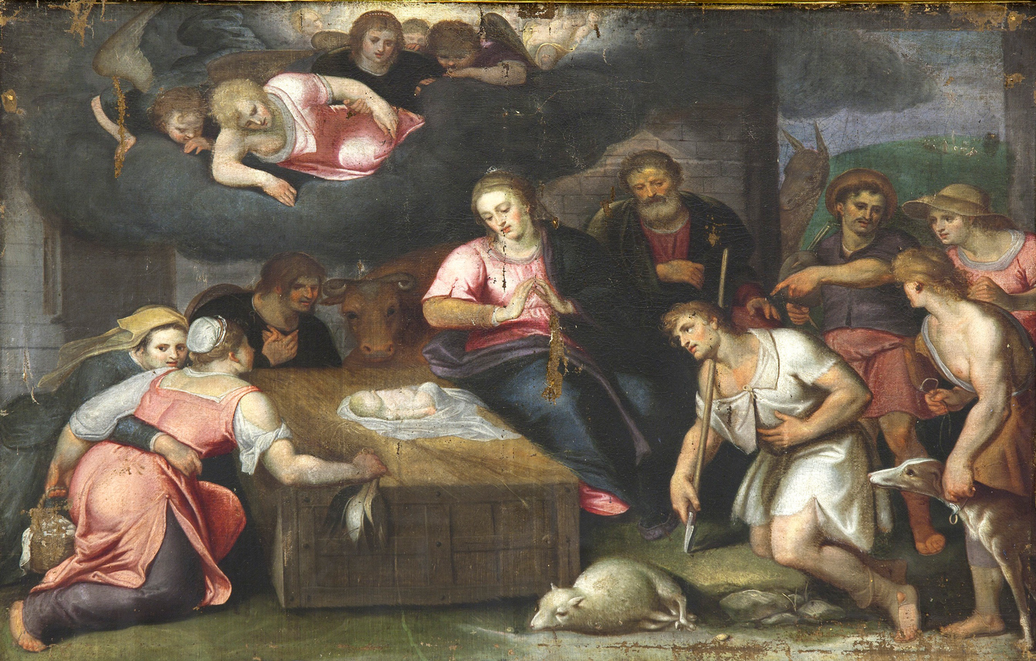 La obra representa el momento en que el Niño Jesús recibió la adoración de los pastores en presencia de su madre, la Virgen María, y de San José.